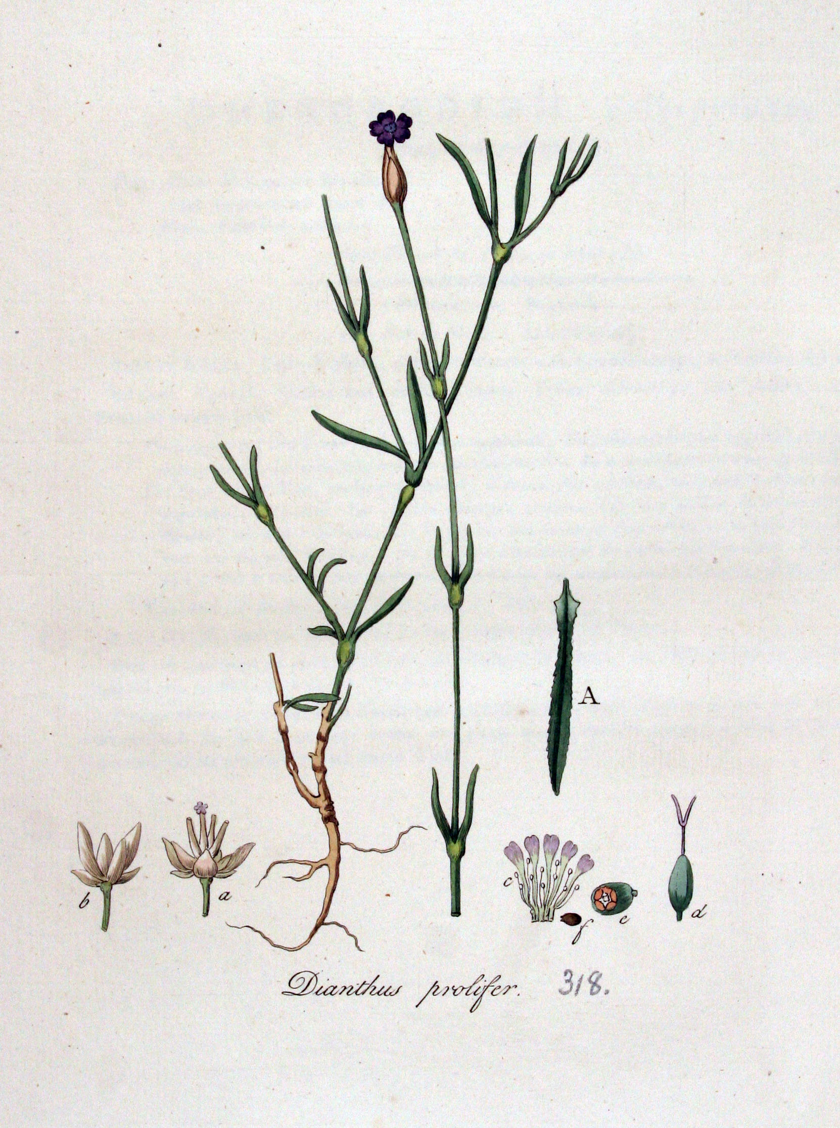 Petrorhagia prolifera (L.) P.W. Ball & Heywood (Syn. Dianthus prolifer L.)